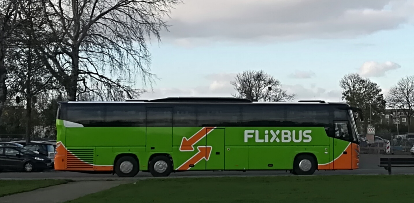 Flixbus-Maastricht Transferium Geusselt